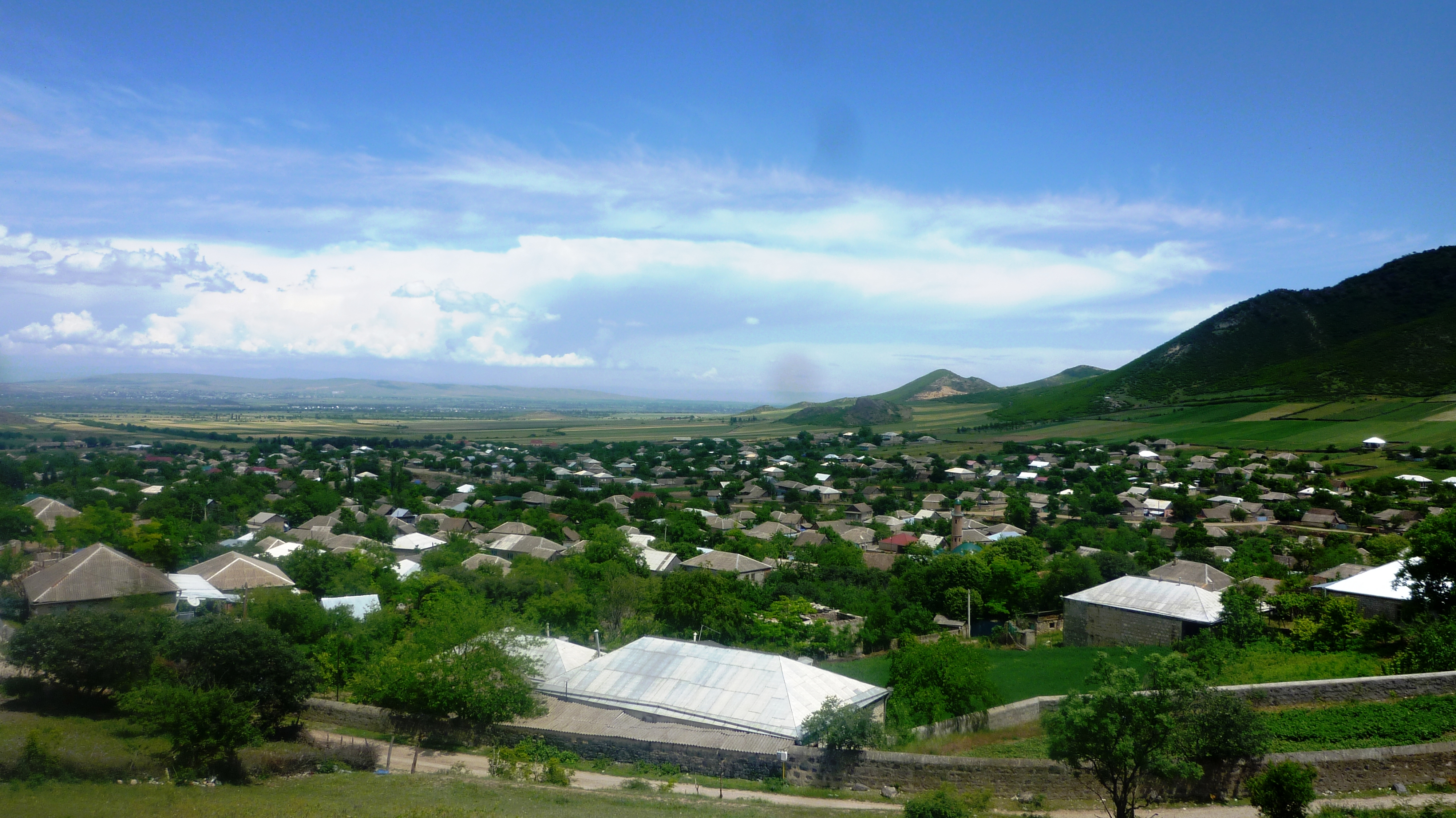 სოფელ ტალავერის ხედი